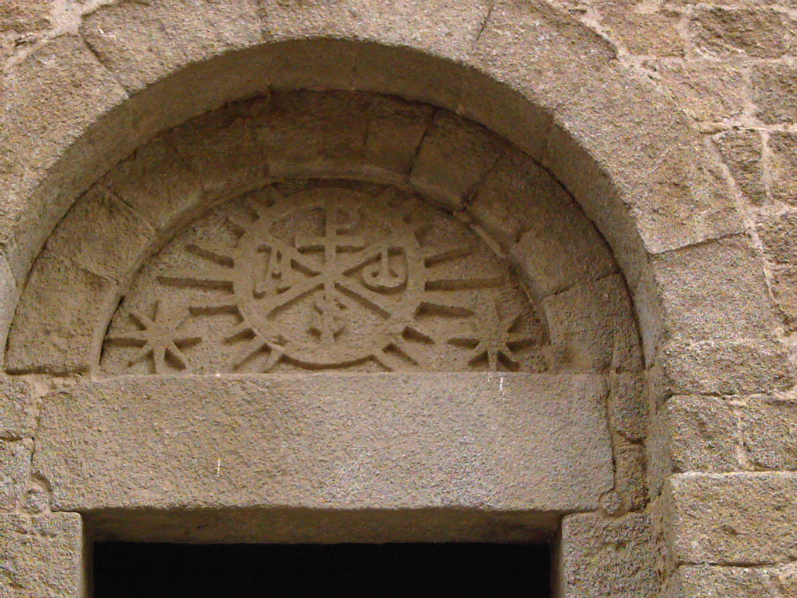 archivolta de la porta